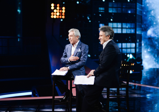 Юрий Николаев и Алексей Пиманов на конкурсе «Новая звезда»